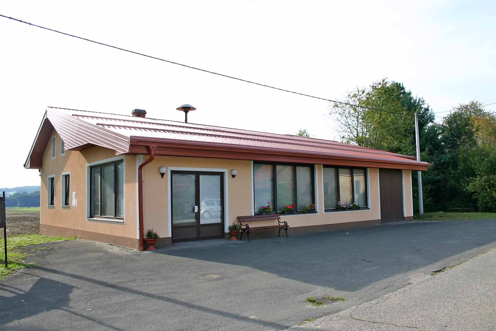 Prostovoljno gasilsko društvo Domajinci. Volunteer fire Domajinci. Freiwillige Feuerwehr Domajinci.